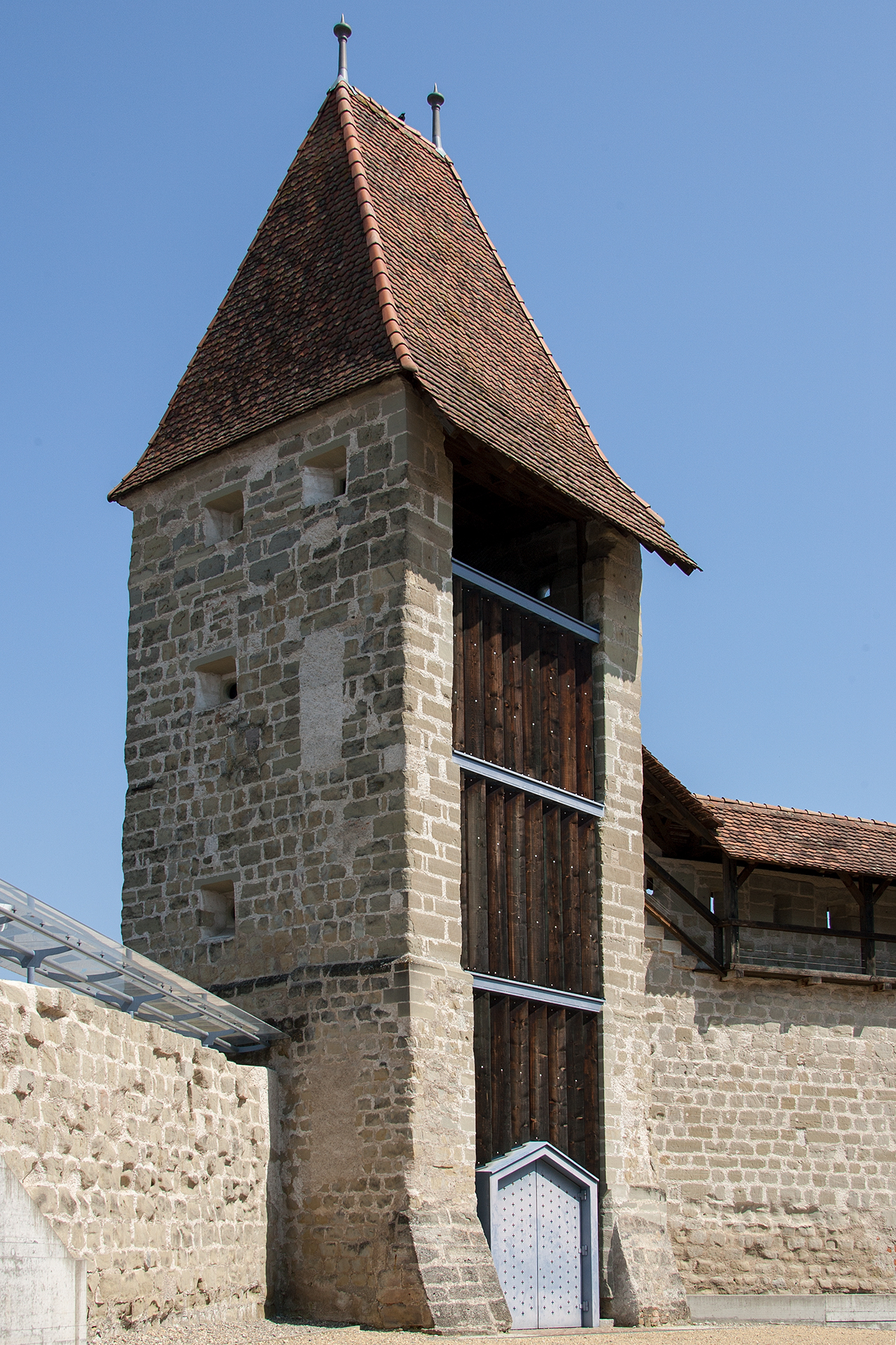 Turm (Stadtmauer) in Payerne (VD)